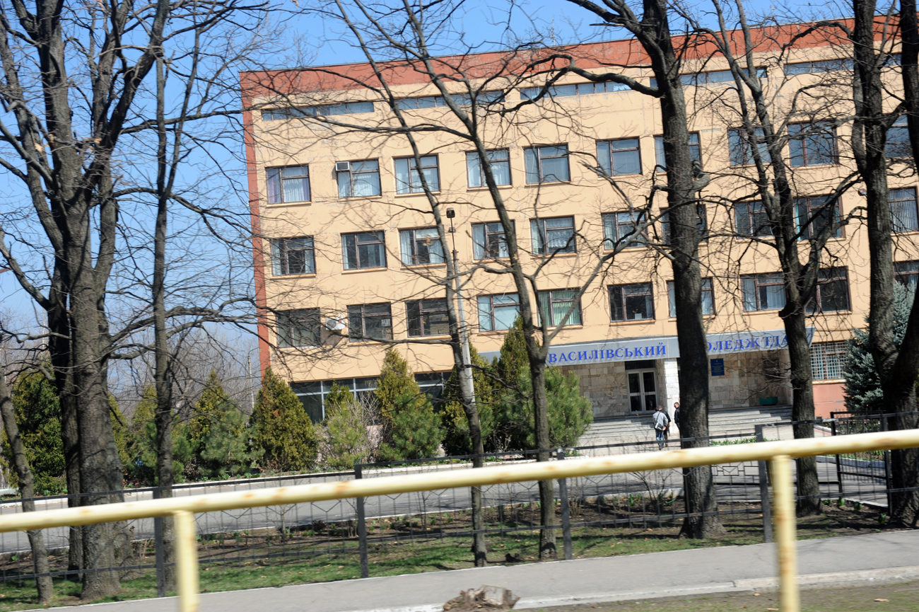 Васильевский коледж